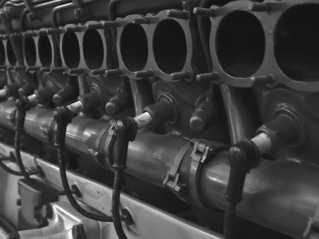 Fiat AS.8 particolare Licensing categoria:immagini di aeroplani